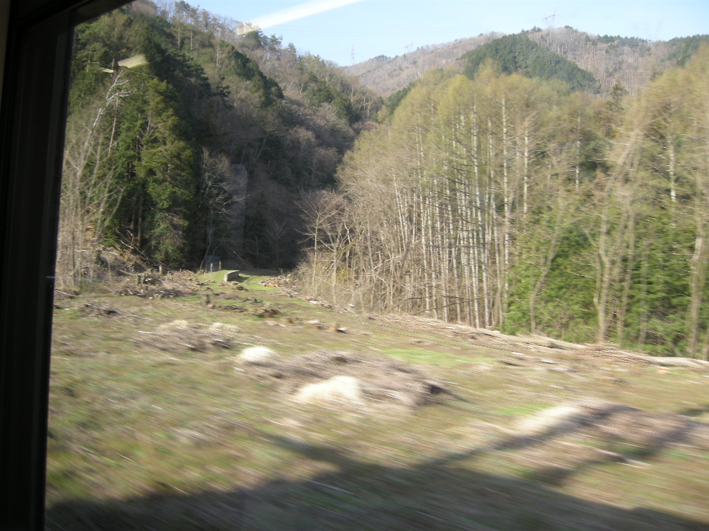 2019-4-23 車内から撮影